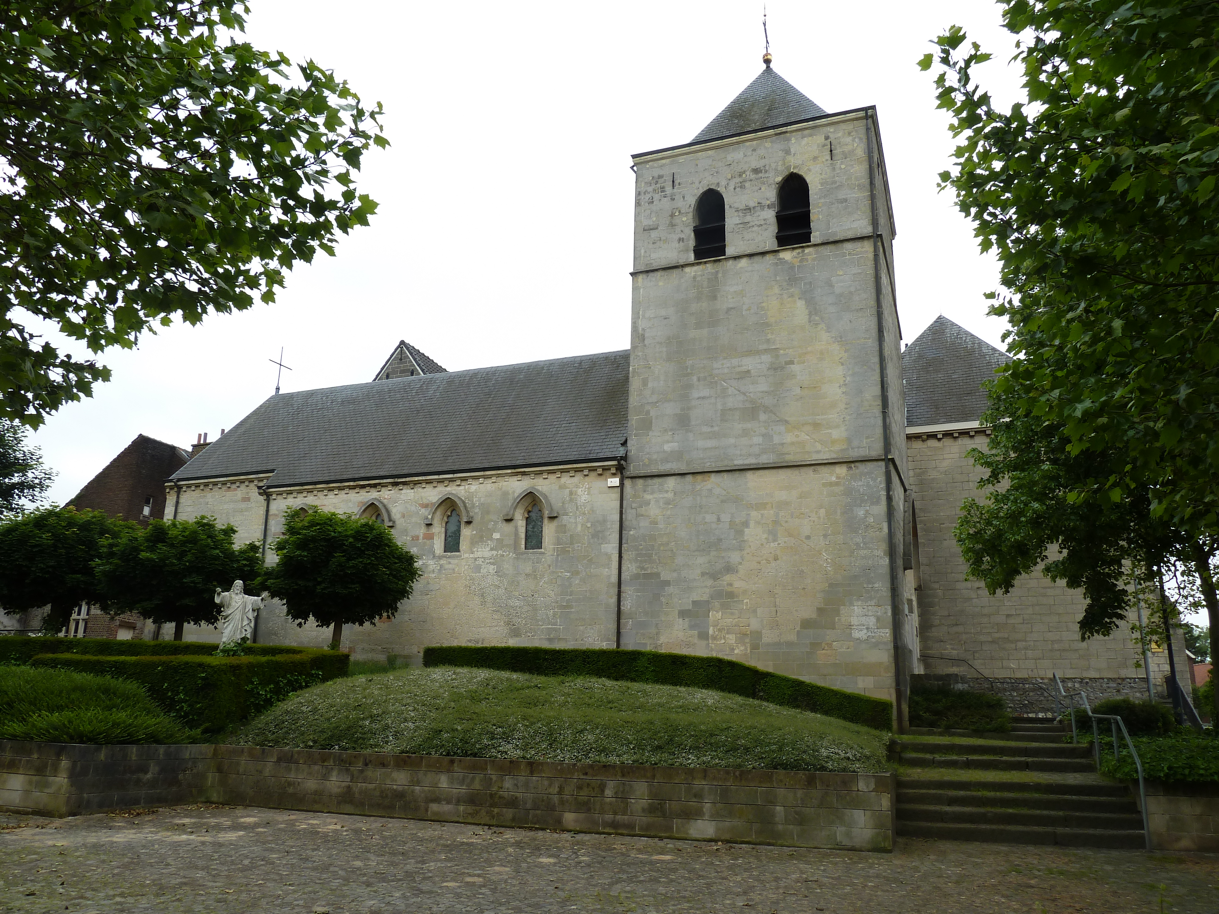 Sint-Severinuskapel, Val-Meer, Riemst, België